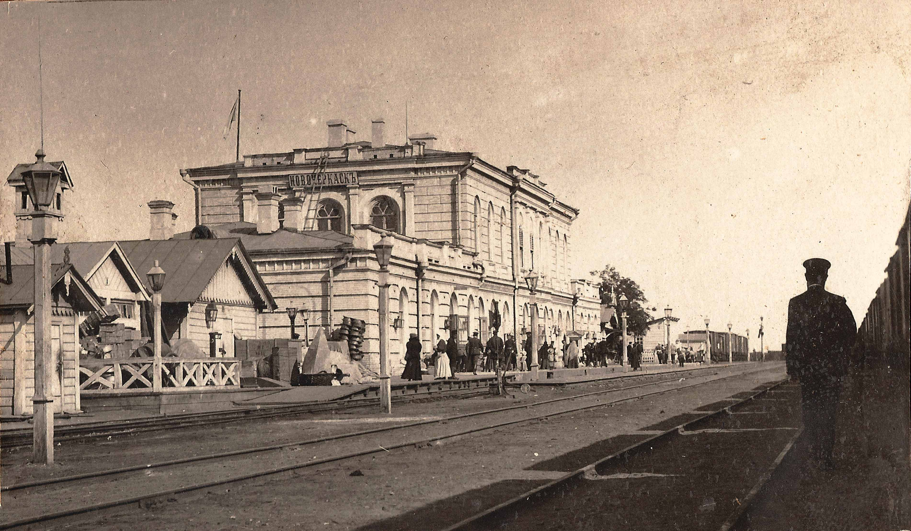 Железнодорожный вокзал в Новочеркасске